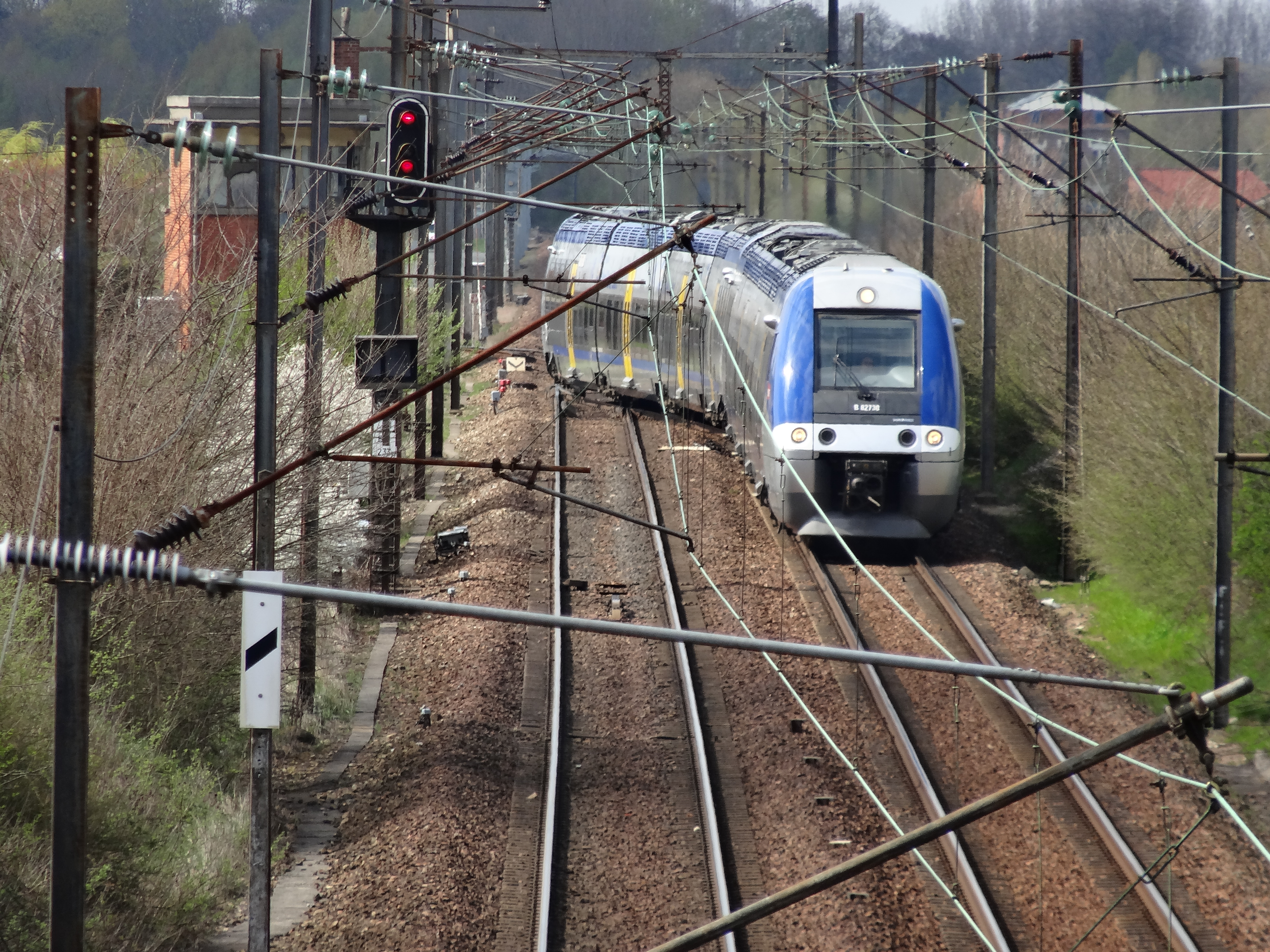 L'autorail B 82500 n° 82730 quitte la voie unique non électrifiée de la ligne de Fives à Abbeville en provenance de Saint-Pol-sur-Ternoise au niveau de la commune de Labeuvrière et rejoint la section commune aux lignes d'Arras à Dunkerque-Locale et de Fives à Abbeville, à double voie et électrifiée, à destination de Béthune.